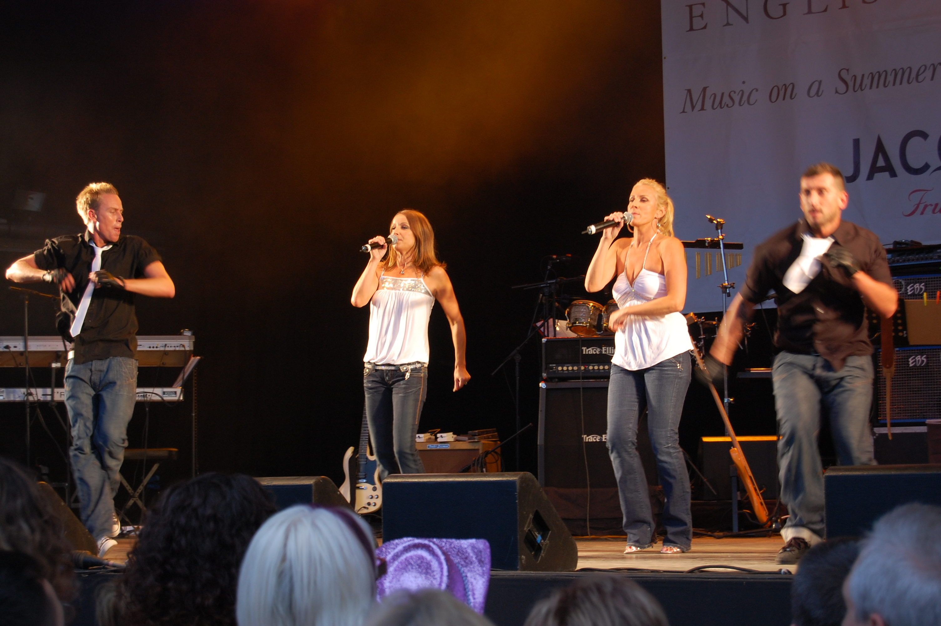 Bananarama, Audley End, Essex, 28/07/07.